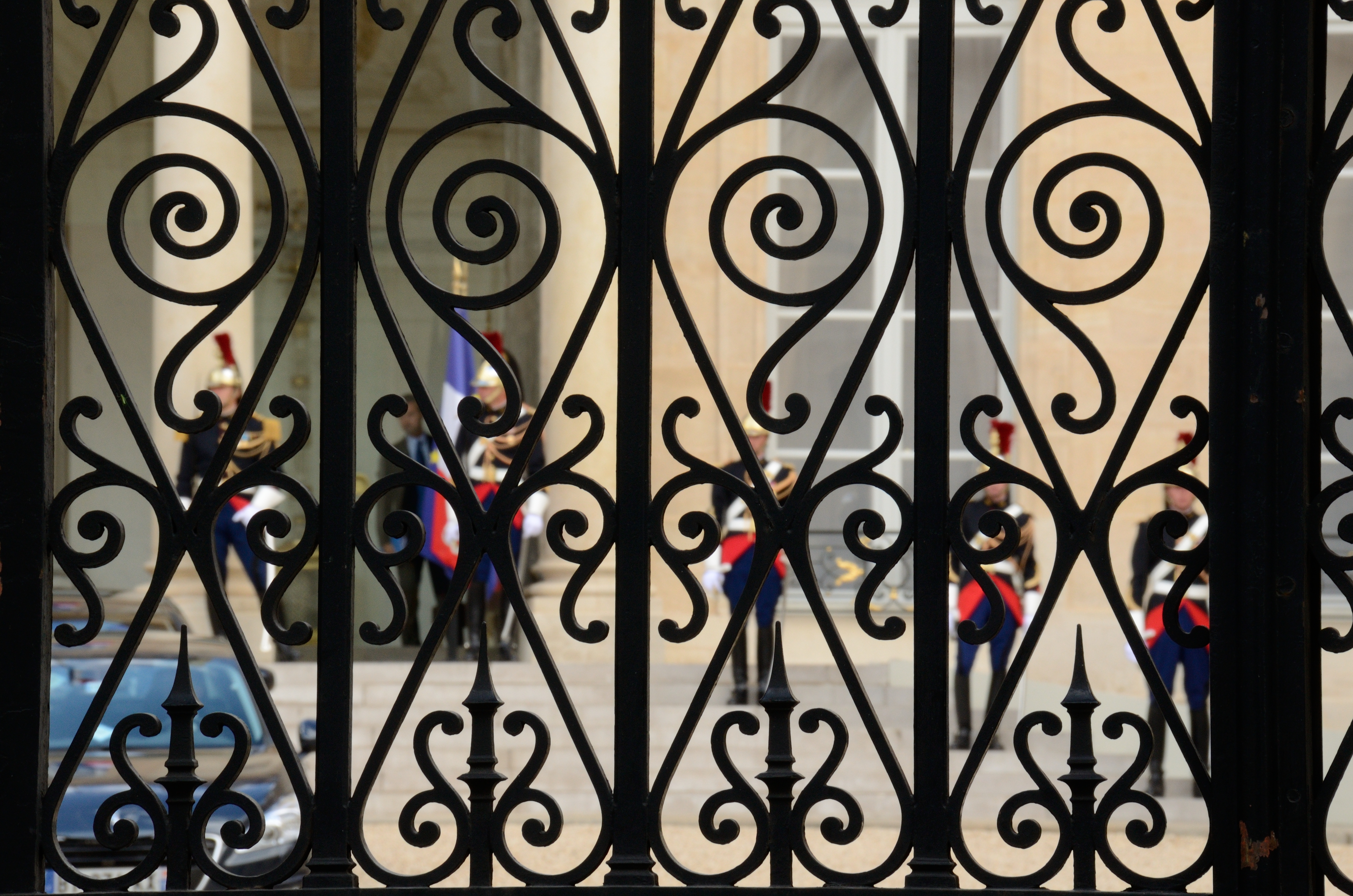 La grille du palais de l'Elysée - Paris